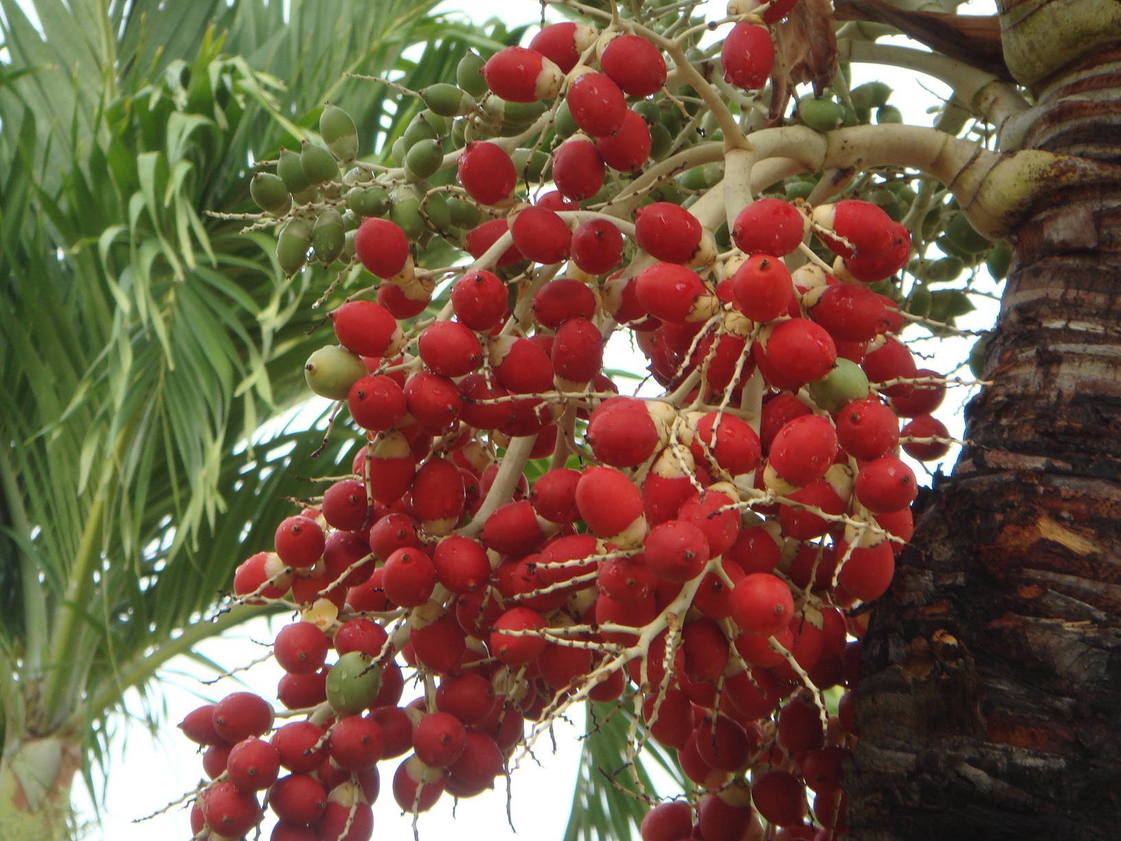 Adonidia merrillii (syn. Veitchia merrillii), Varadero, Cuba.